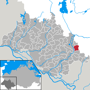 Blievenstorf in Mecklenburg-Vorpommern - district Ludwigslust